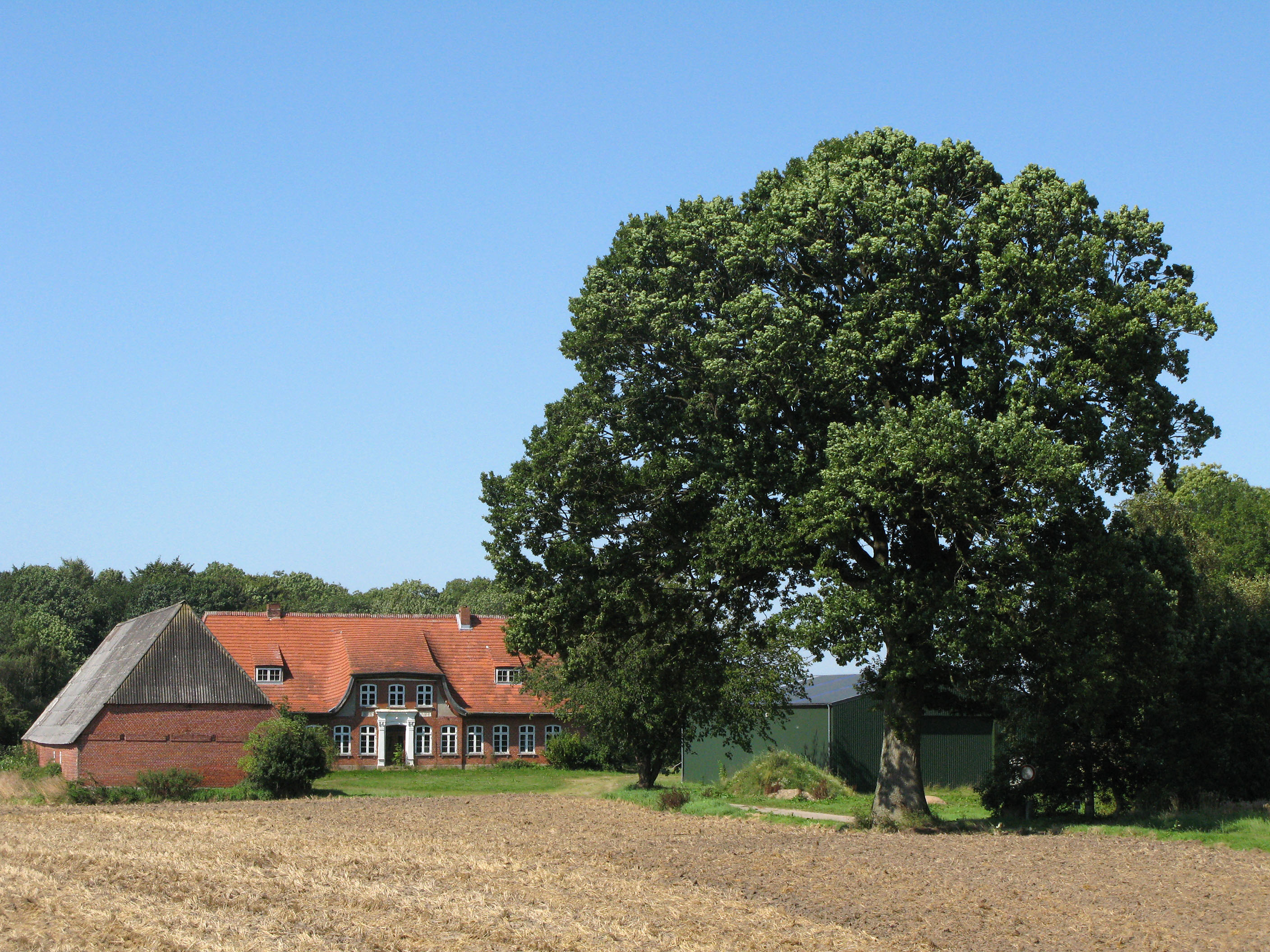 Hof Ahnebygaard, Gesamtansicht